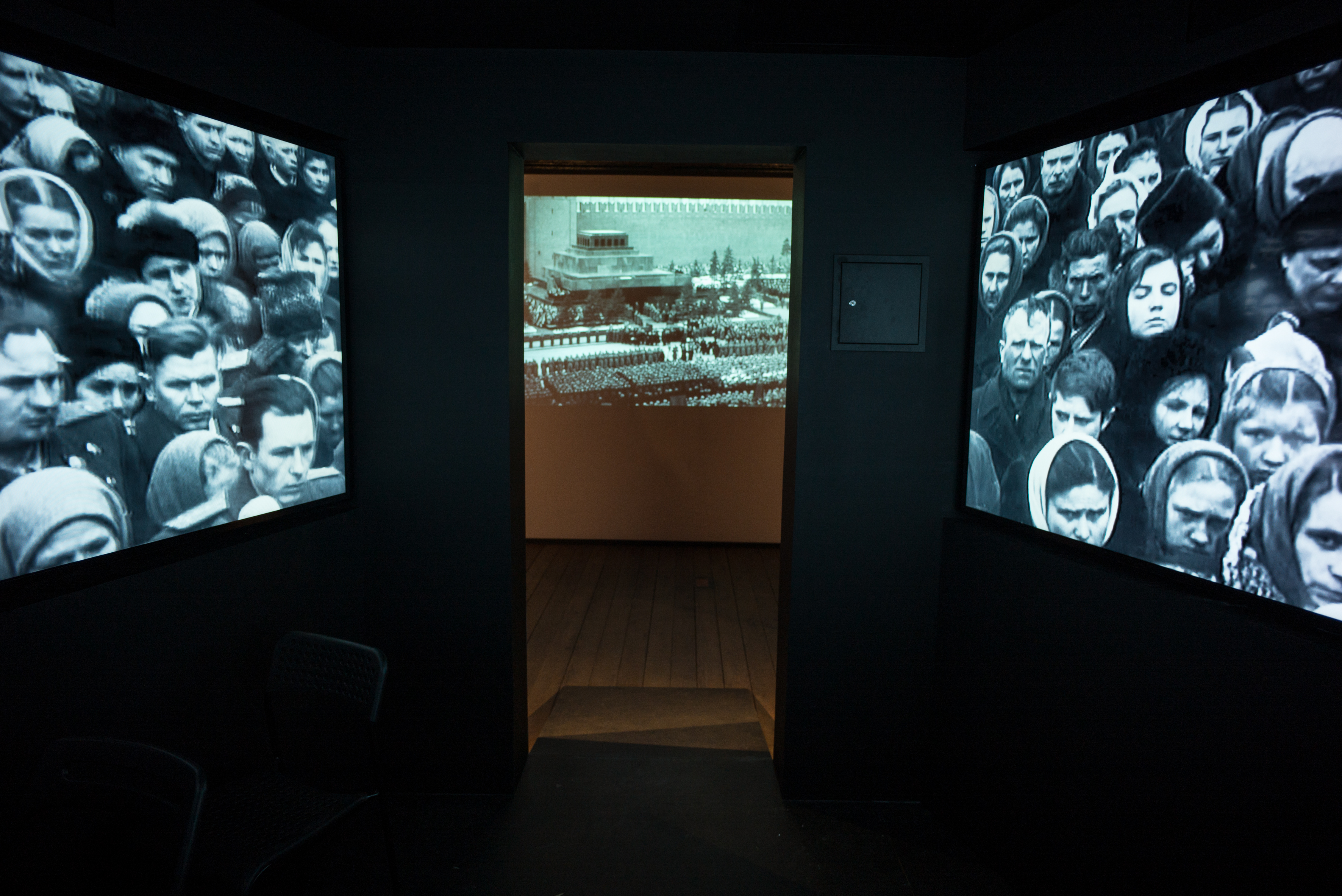 Экспозиция Музея истории ГУЛАГа_2